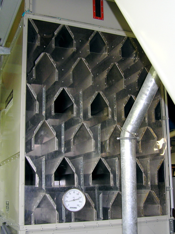 Getreidetrockner, grain dryer